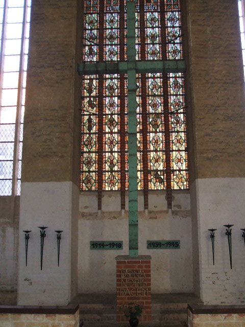 Stralsund, Germany, Kreuz und Buntglasfenster "Der Auferstandene" von 1913, Gedenkstätte der in den zwei Weltkriegen gefallenen Soldaten in der Marienkirche